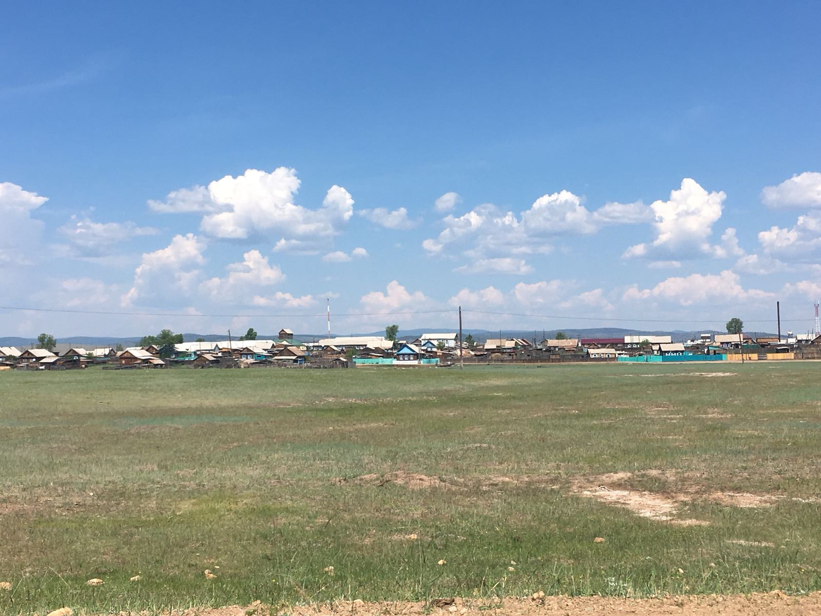 Село Можайка, Еравнинский район